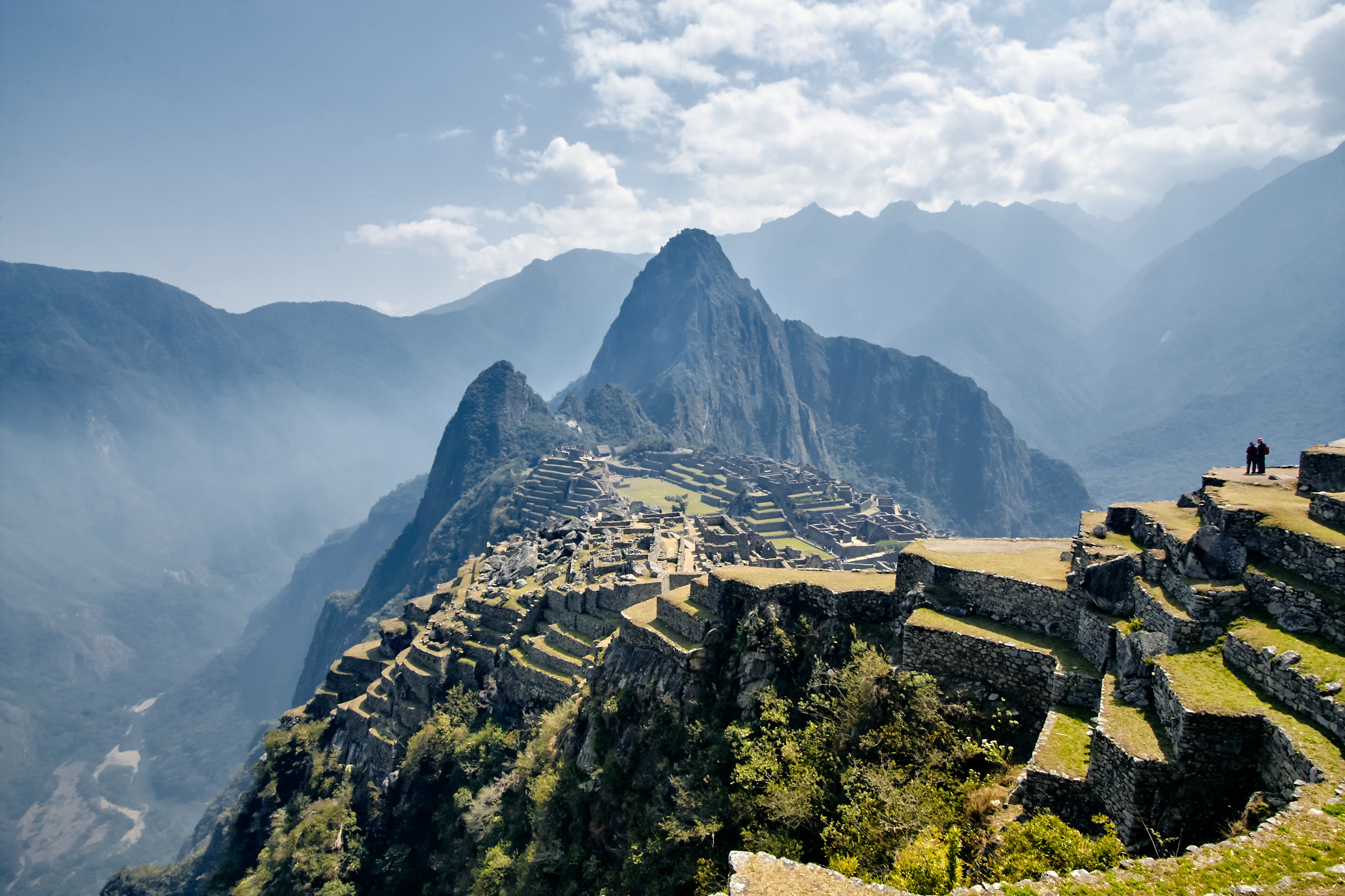 Machu Picchu, Peru